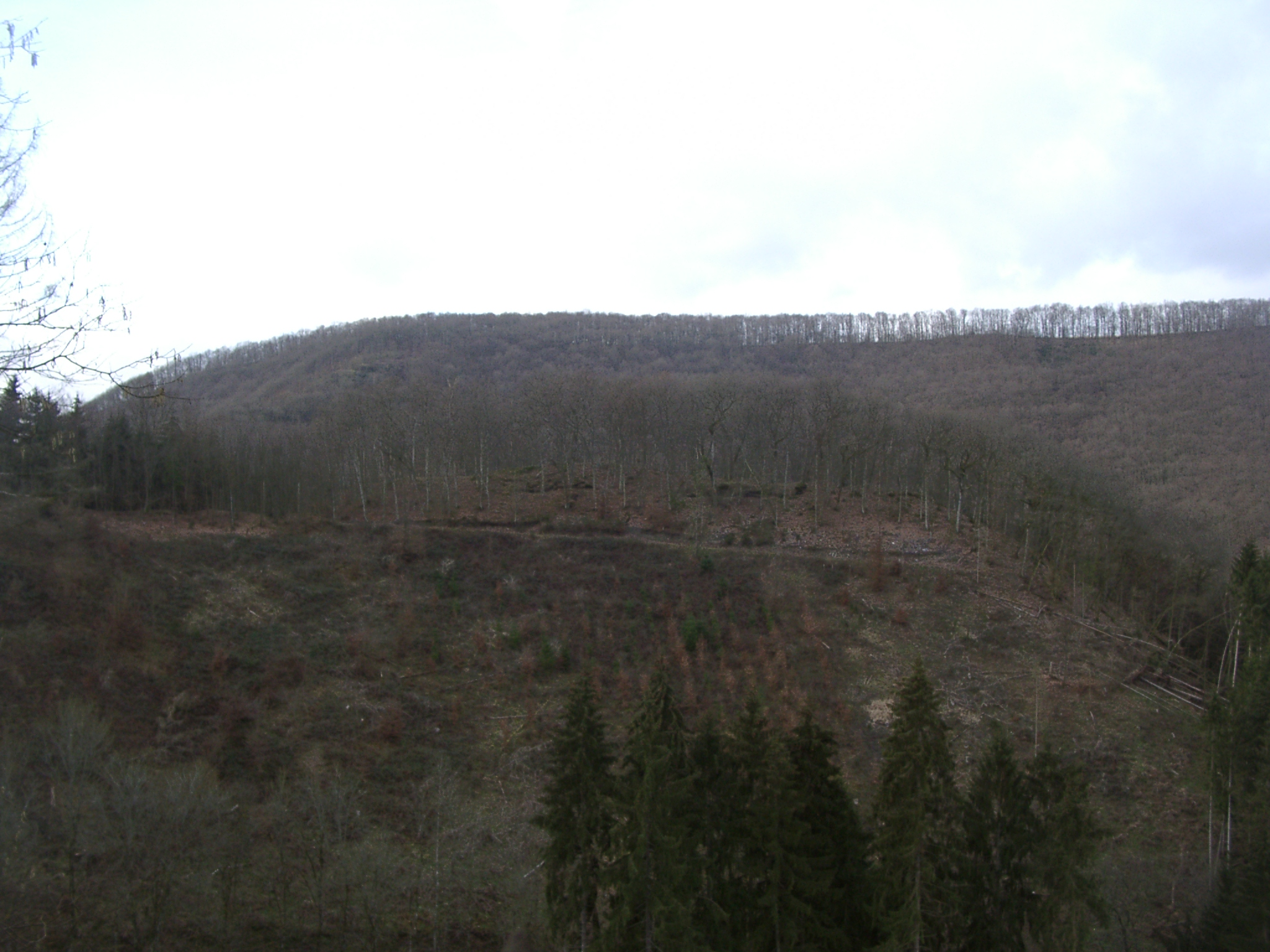 Alteburg bei Zell (Mosel), Gesamtansicht von Norden